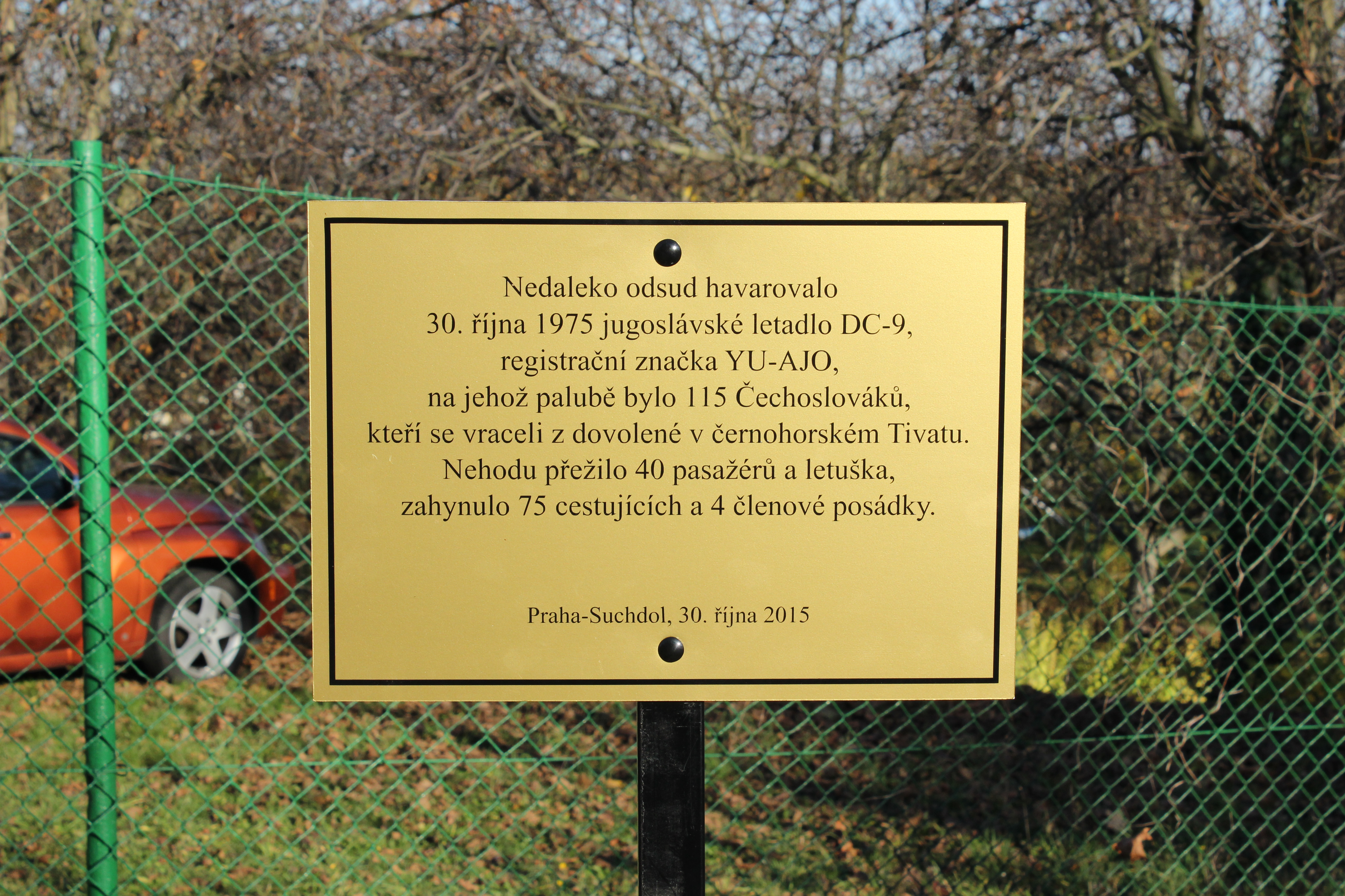 Informační tabulka prozatimního pomníku leteckému neštětí z 30. října 1975 v pražském Suchdole. Pomník byl odhalen při čtyřicátém výročí tragédie v roce 2015.